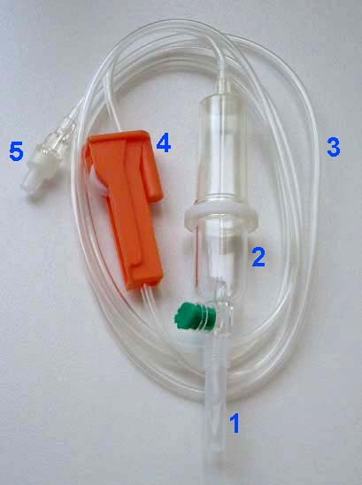 Infusionsbesteck (Infusionssystem) (1) Einstichdorn in die Infusion (hier mit Schutzkappe) (2) Tropfkammer, Entlüftungskappe (grün) (3) Leitung (4) Flusskontrollrad (5) Anschluss an Venenverweilkanüle